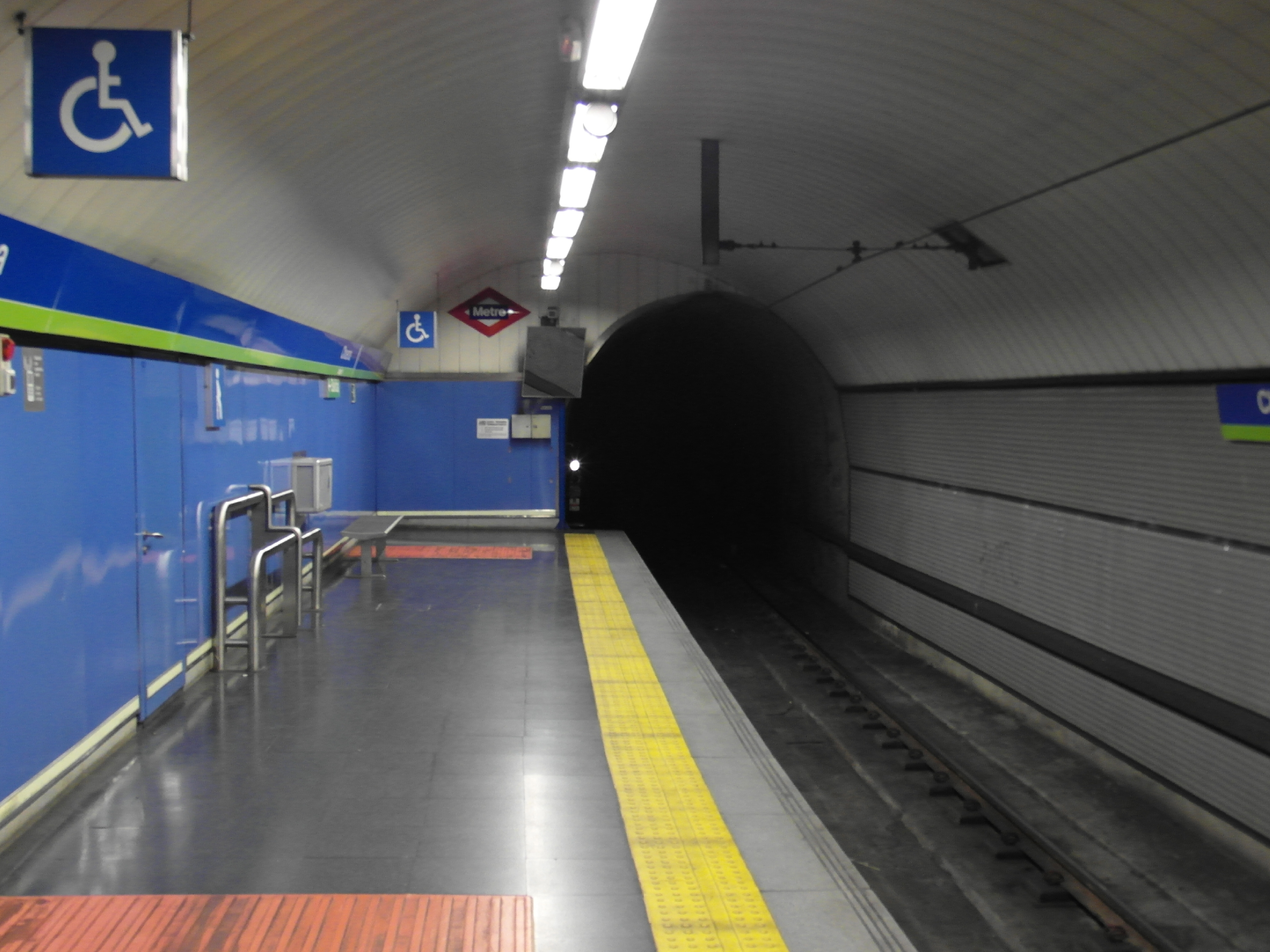 Madrid - Metro - Estación de Chueca